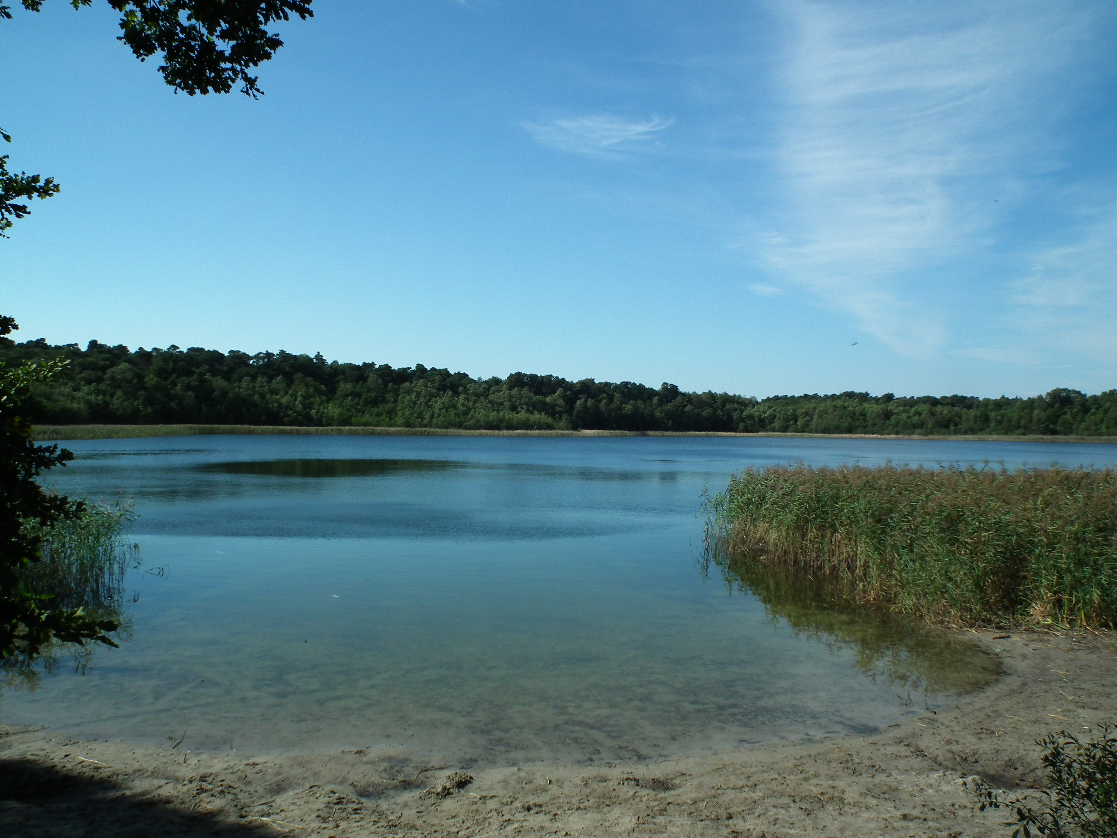 Rezerwat przyr. Jezioro Debiniec koło Promna.